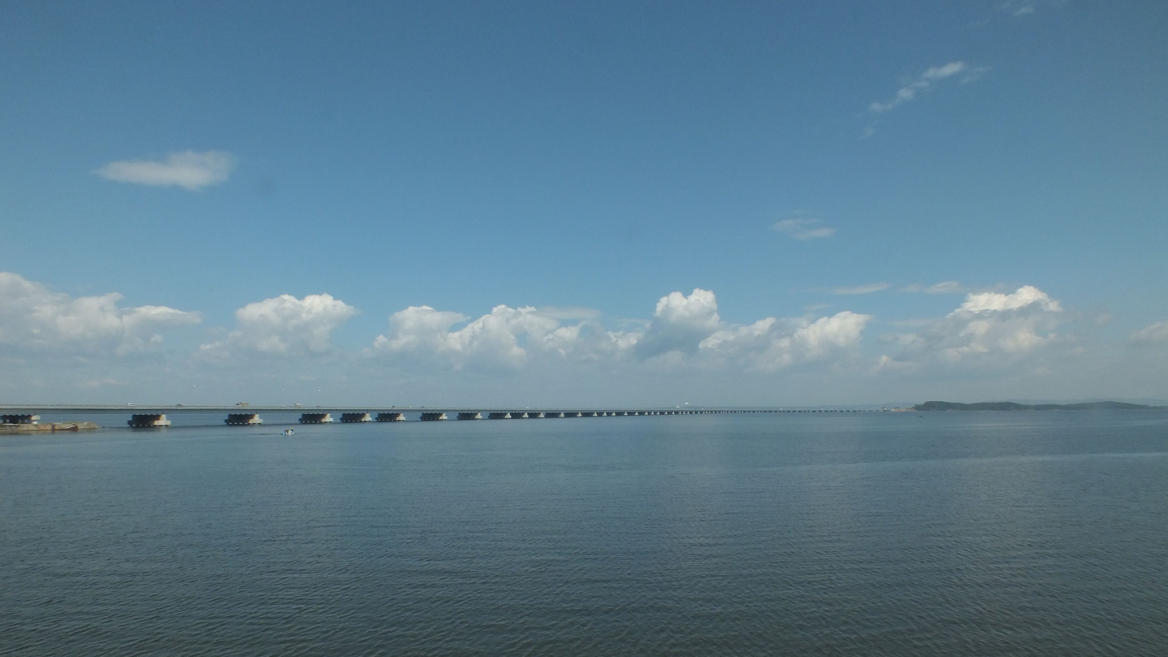 Владивосток, мост на Де-Фриз